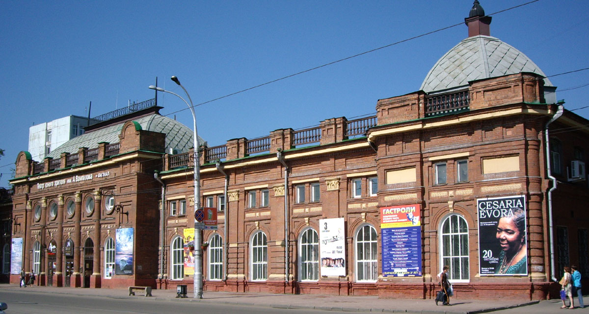 Здание Филиала Иркутского ТЮЗа им. Вампилова